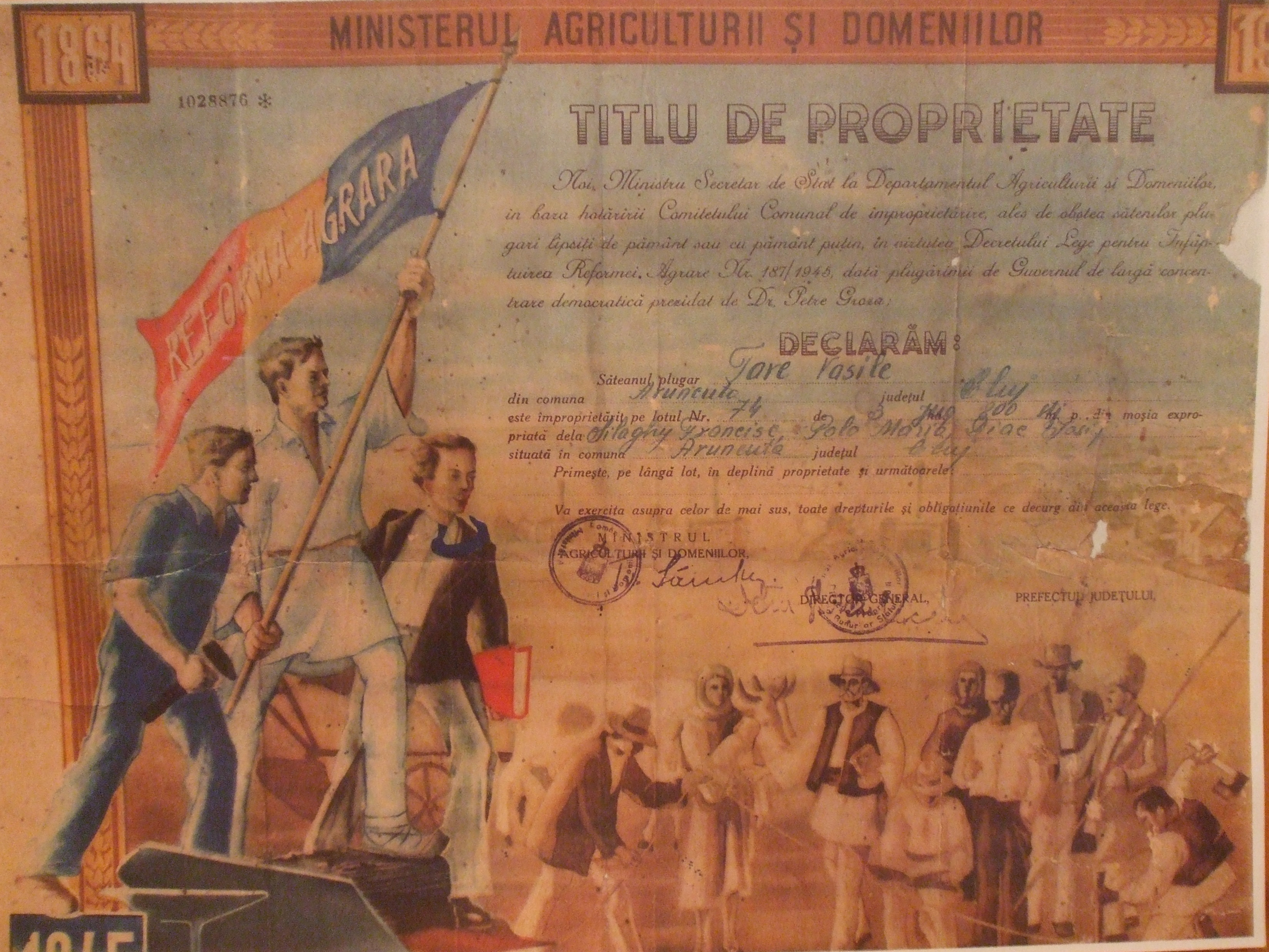 Titlu de proprietate emis în baza reformei agrare din martie 1945